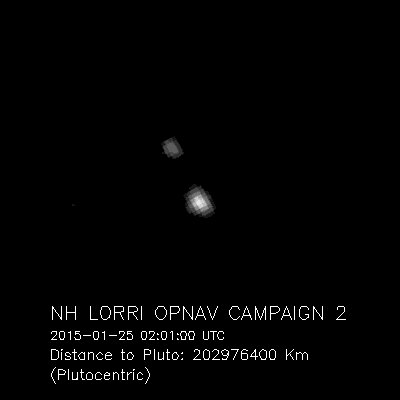 Photo de Pluton et Charon obtenue par l'instrument LORRI de la sonde New Horizons le 25 janvier 2015 à 2 h 01 UTC alors qu'elle se trouvait à 202'976'400 km de Pluton.